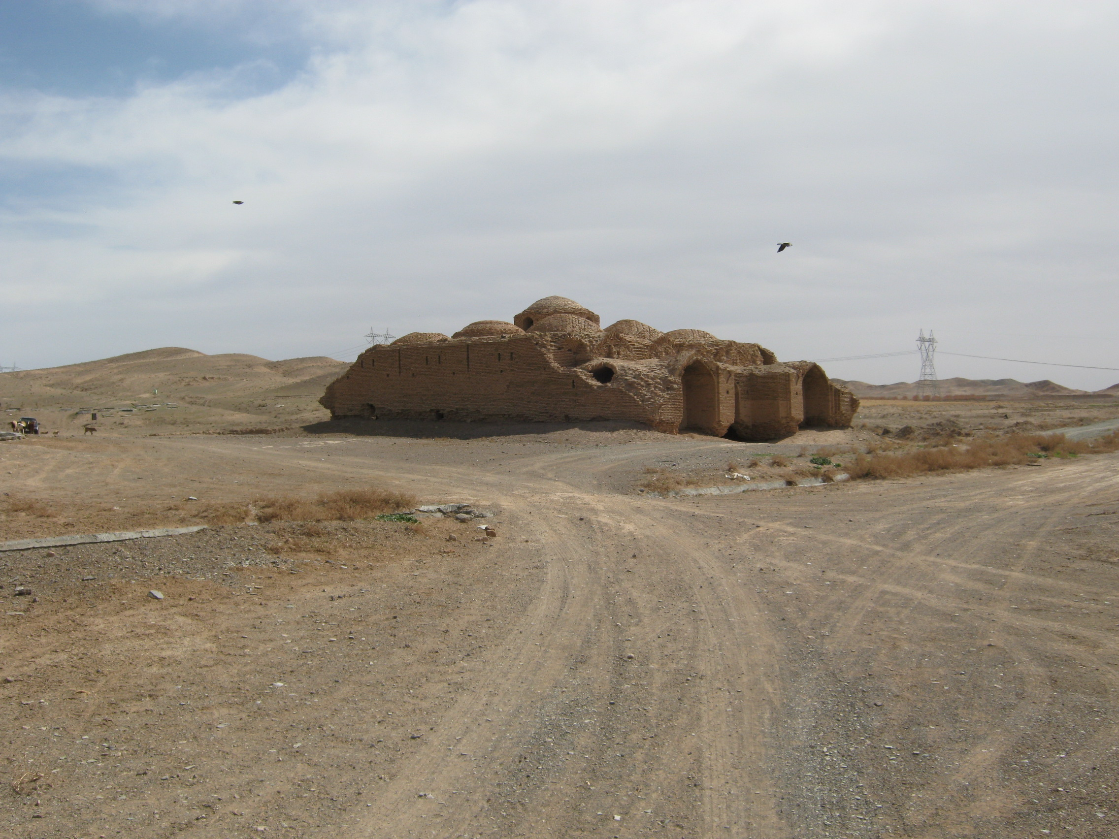 رباط زرنوخ